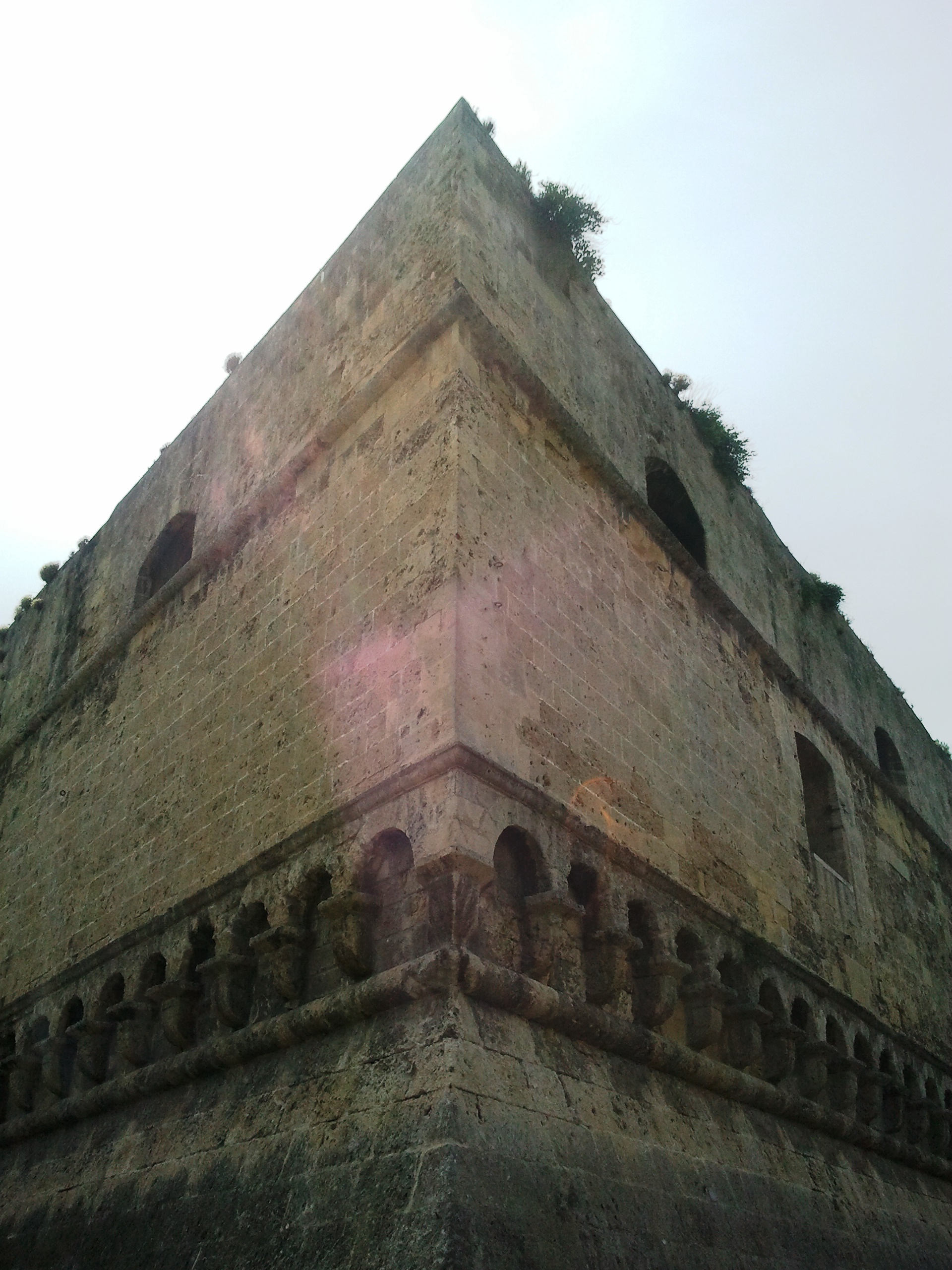 Fabio Cianciola